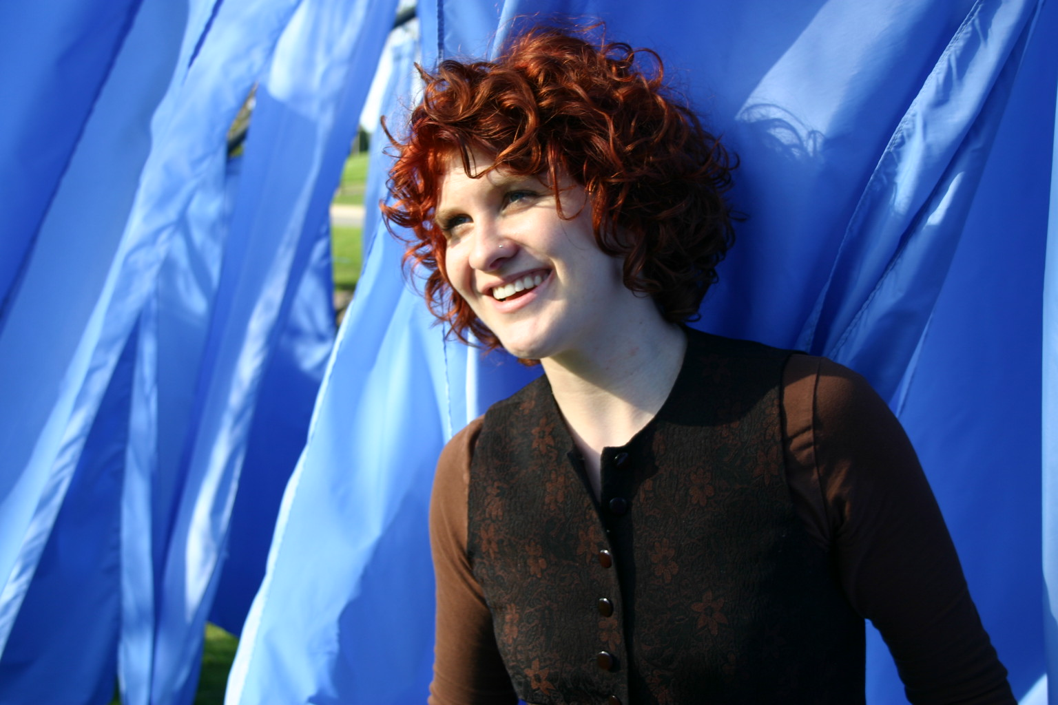 Anke Johannsen, piano & vocal